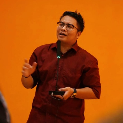 Kawendra di ulang tahun GeKrafs yang pertama pada 22 Januari 2020